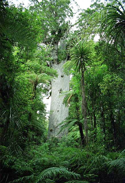 Kauri (Tane Mahuta)